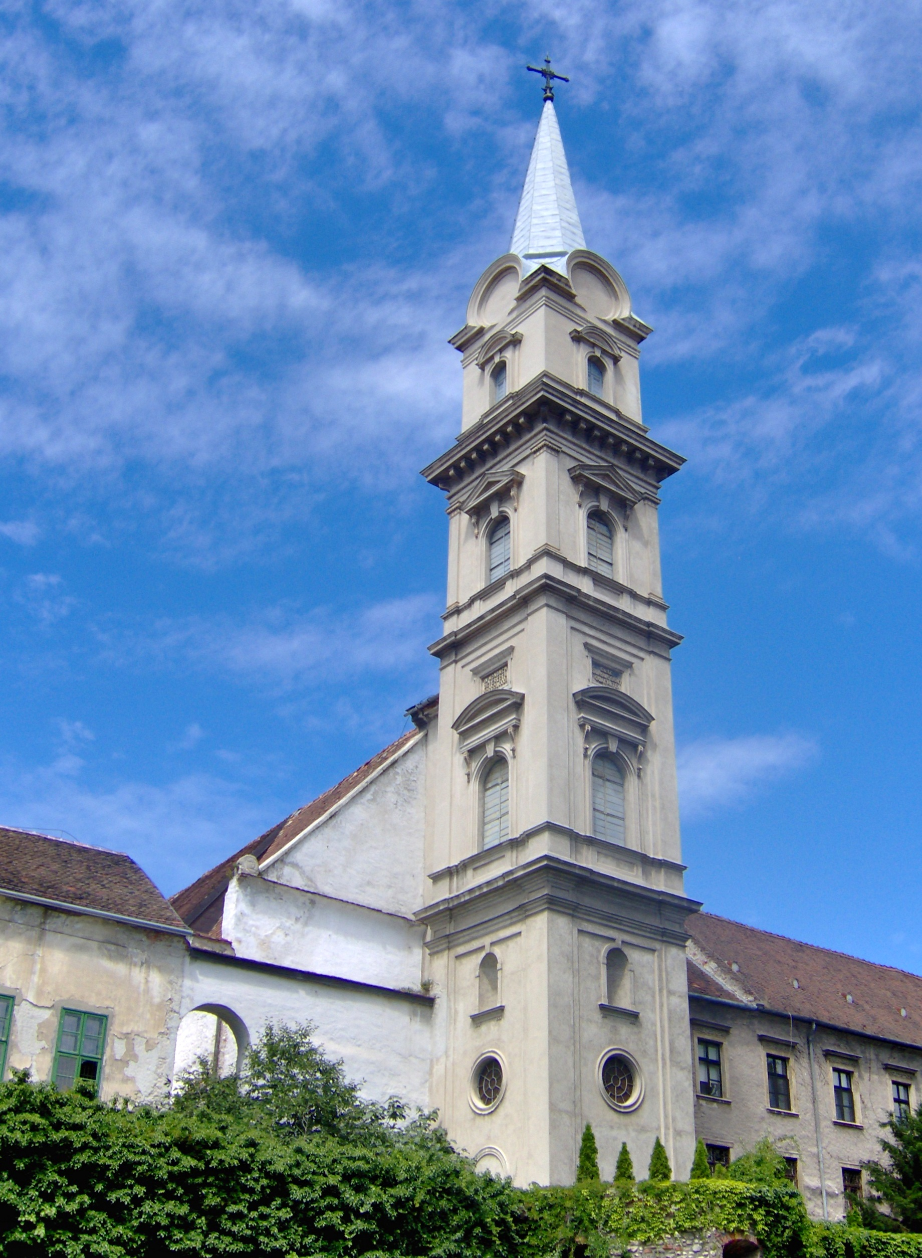 Sopron belvárosa, 2012.7.14.